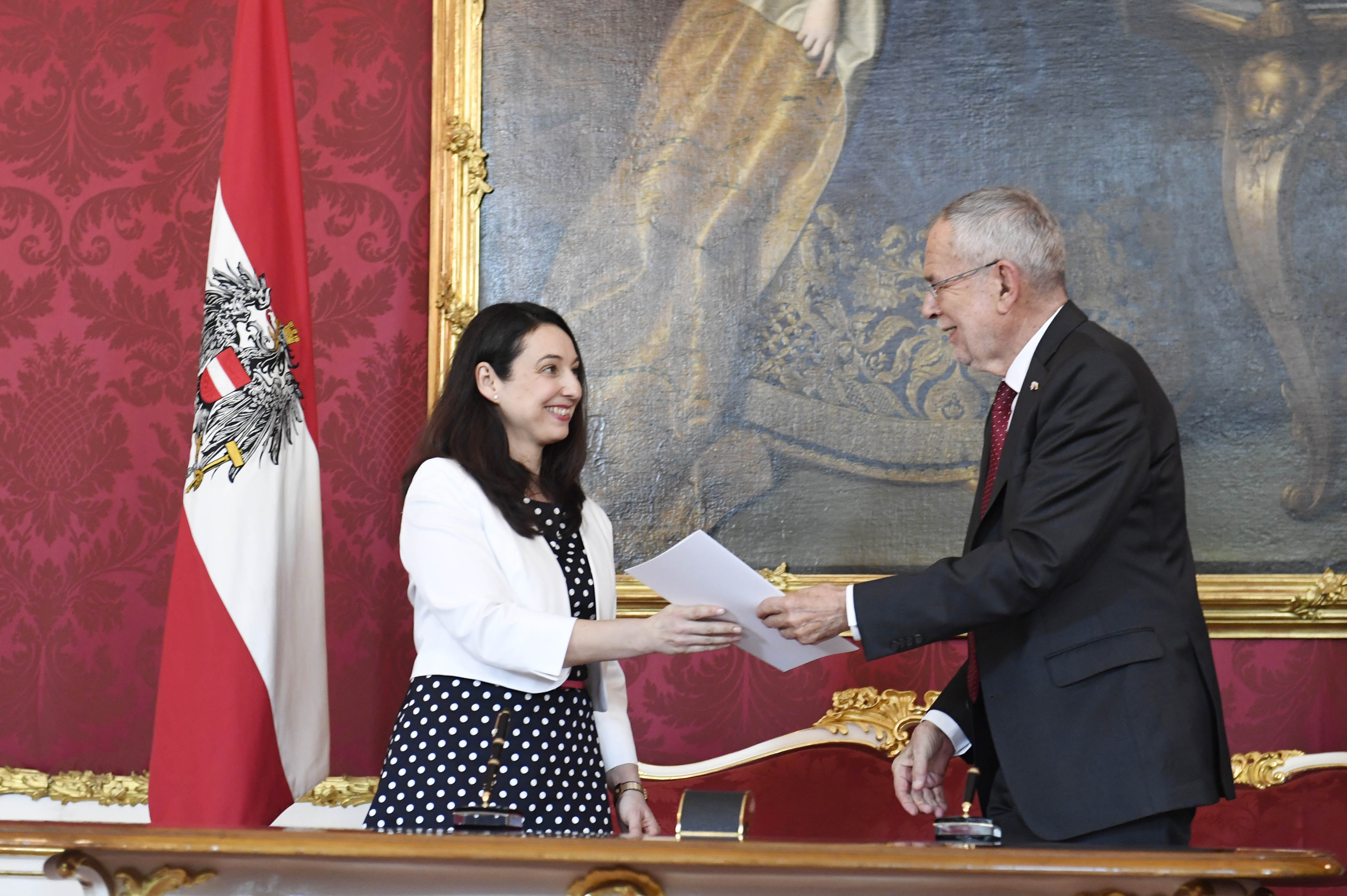 Am 3. Juni 2019 wurde Mag. Alexander Schallenberg als Bundesminister für Europa, Integration und Äußeres angelobt. Foto: Mahmoud